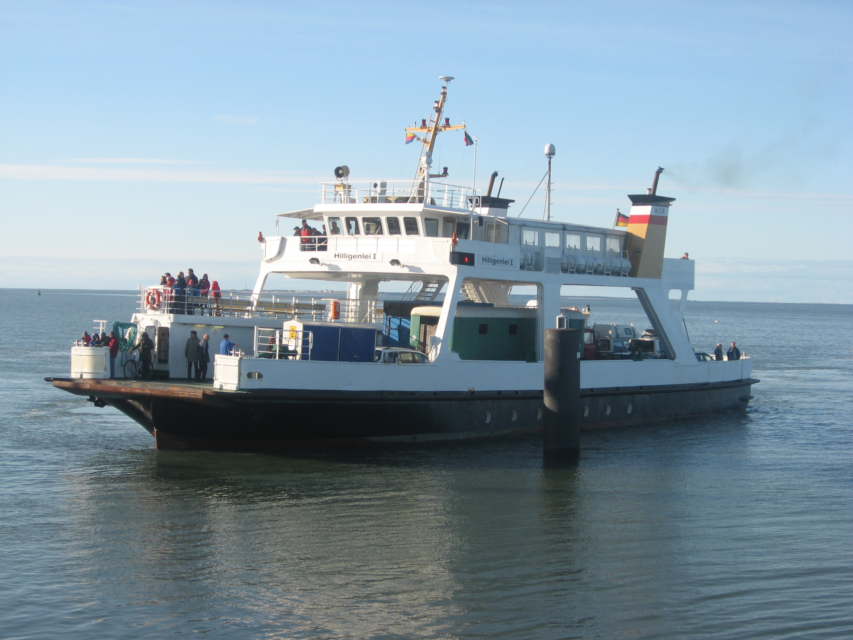 Hilligenlei I am Fährenanleger von Hallig Hooge